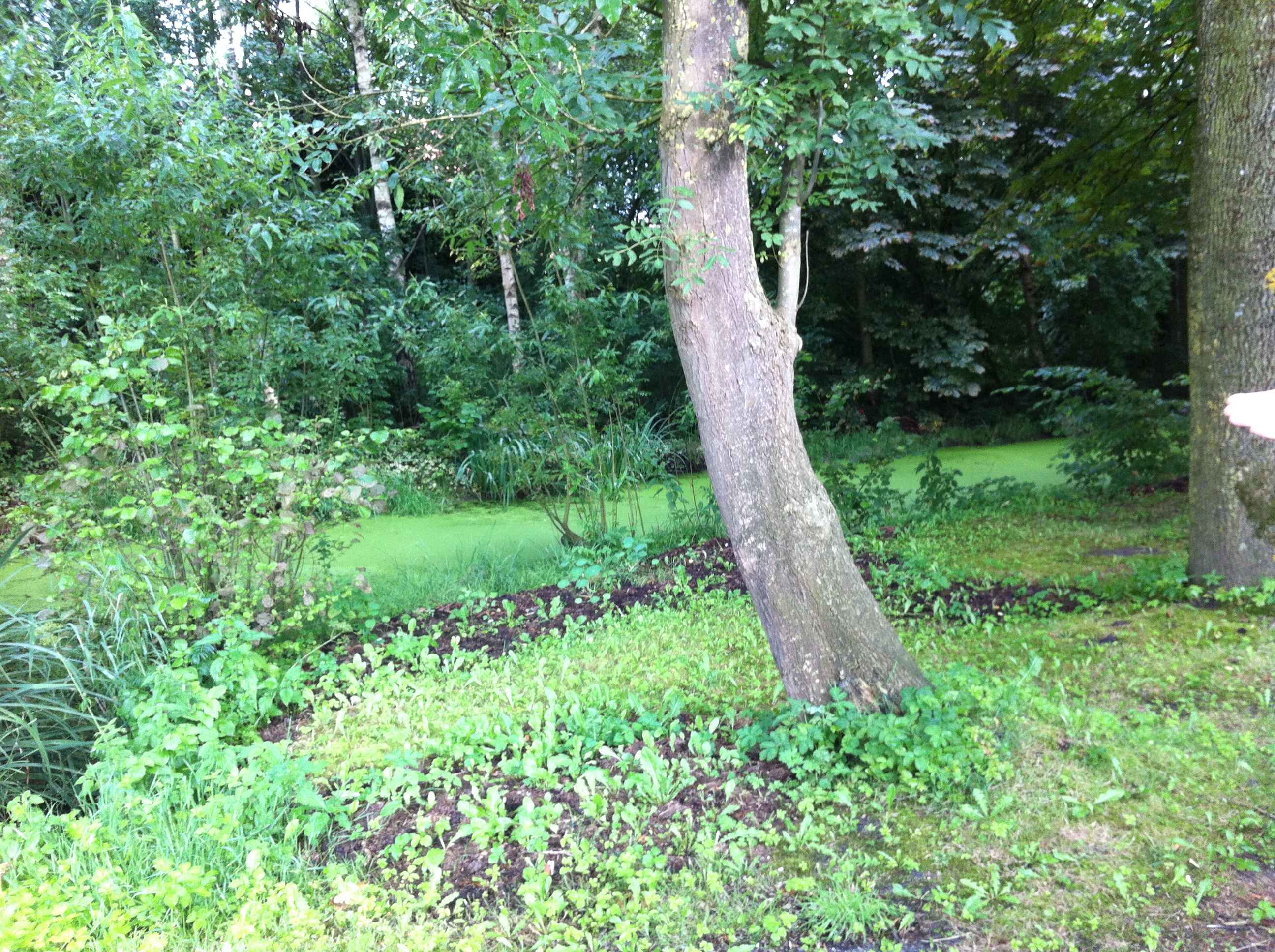 Graben um den Hof Hündling 44, Bahnhofstraße, Ihrhove, Gemeinde Westoverledingen, Landkreis Leer, Niedersachsen, Deutschland